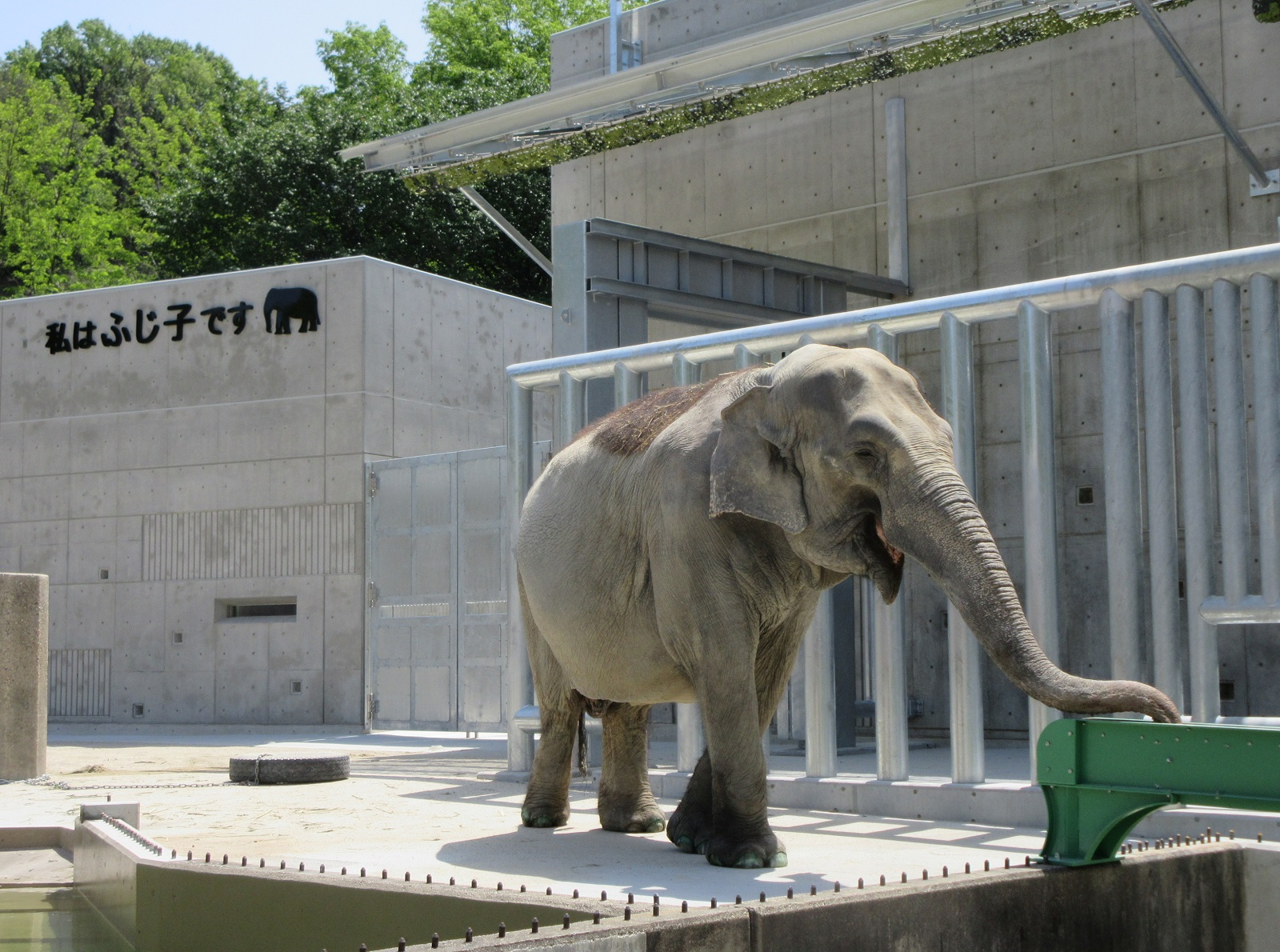 東公園動物園のゾウの「ふじ子」